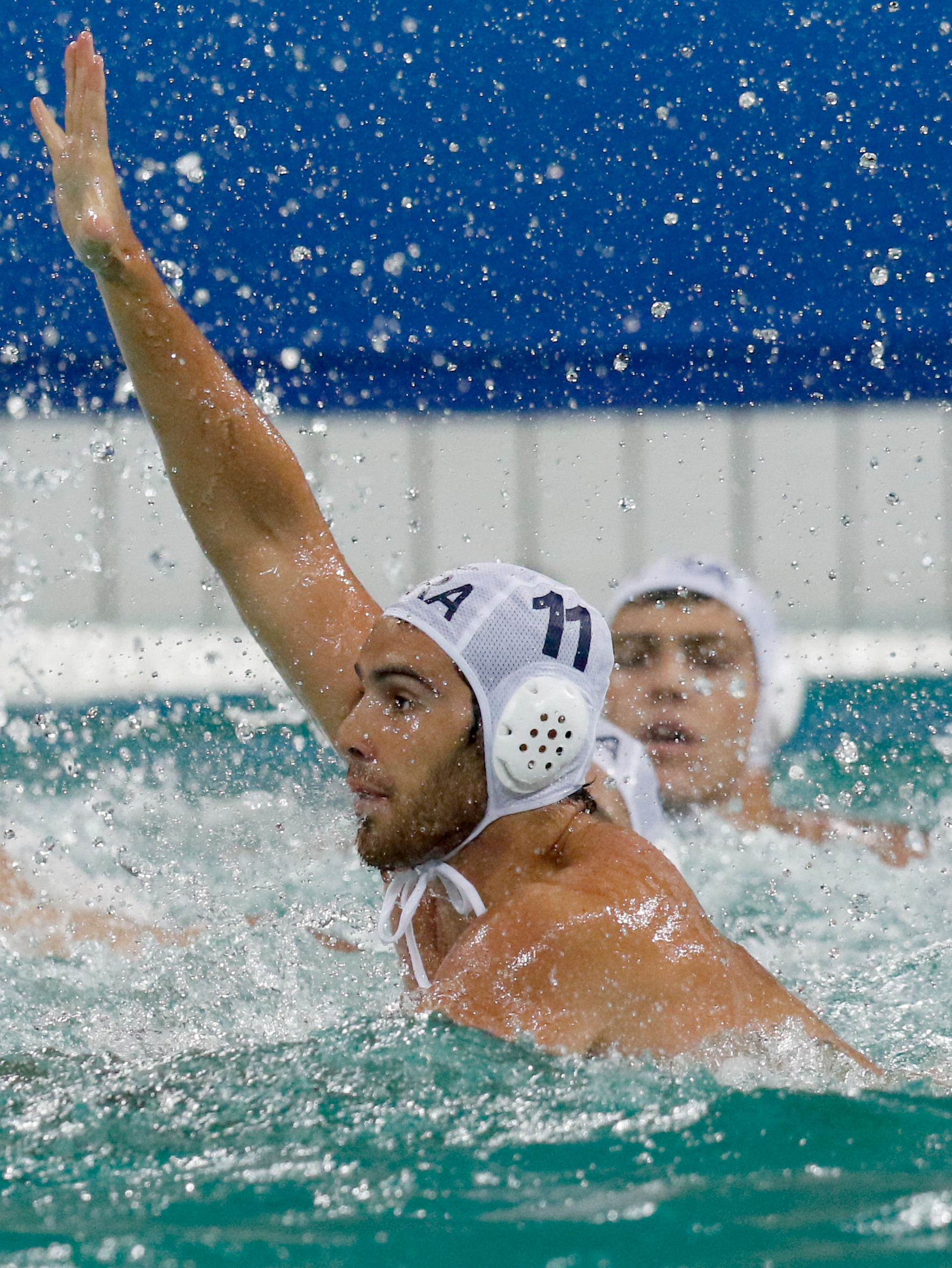 Rio de Janeiro - Seleção masculina brasileira de polo aquático vence a da Sérvia por 6 a 5 nos Jogos Olímpicos Rio 2016, no Parque Aquático Maria Lenk (Fernando Frazão/Agência Brasil)